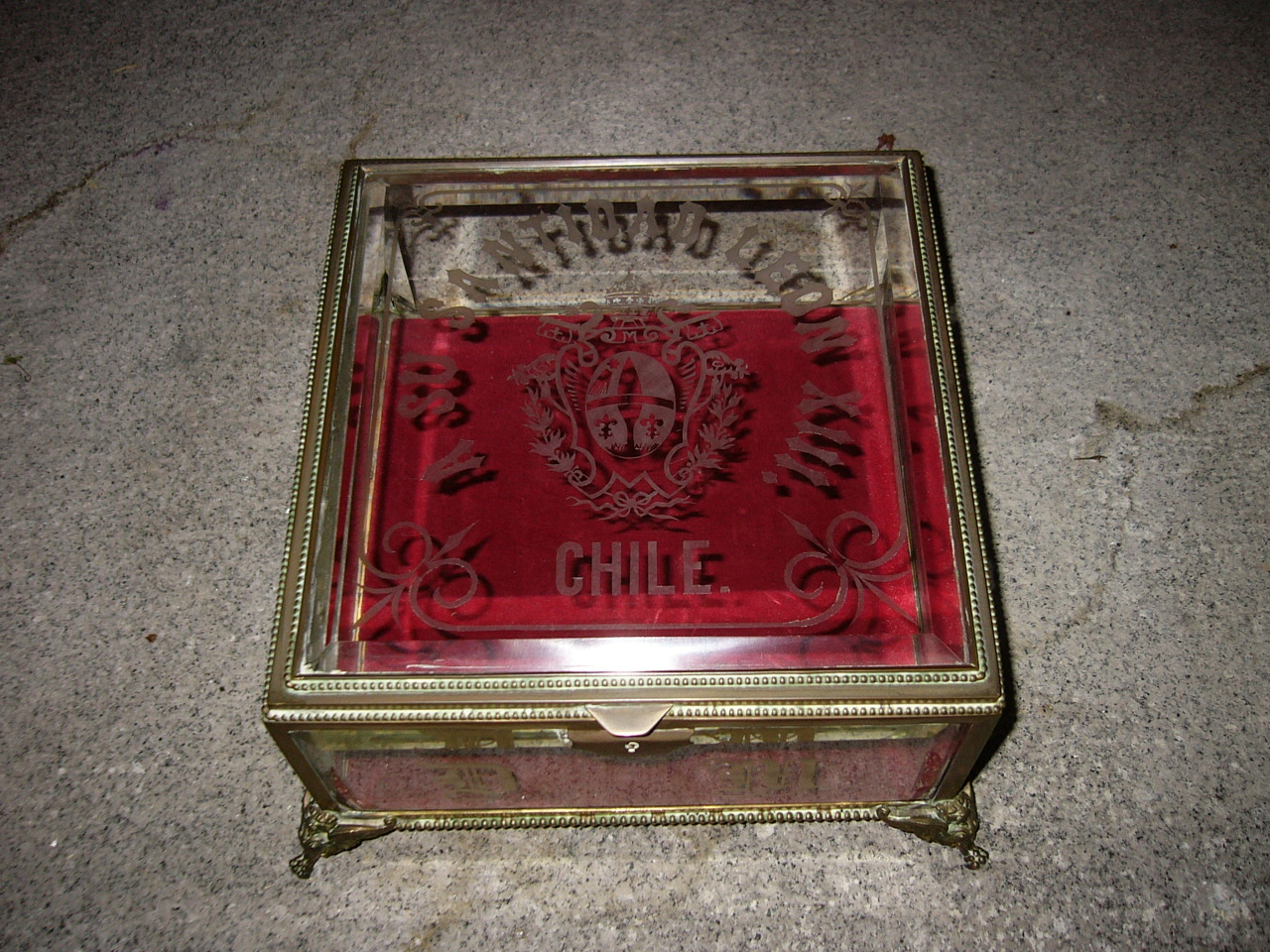 Descripción: Cofre Objeto: Obsequio al Papa León XIII Fotógrafo: © Manuel González Olaechea y Franco Fecha : 21 de agosto de 2004